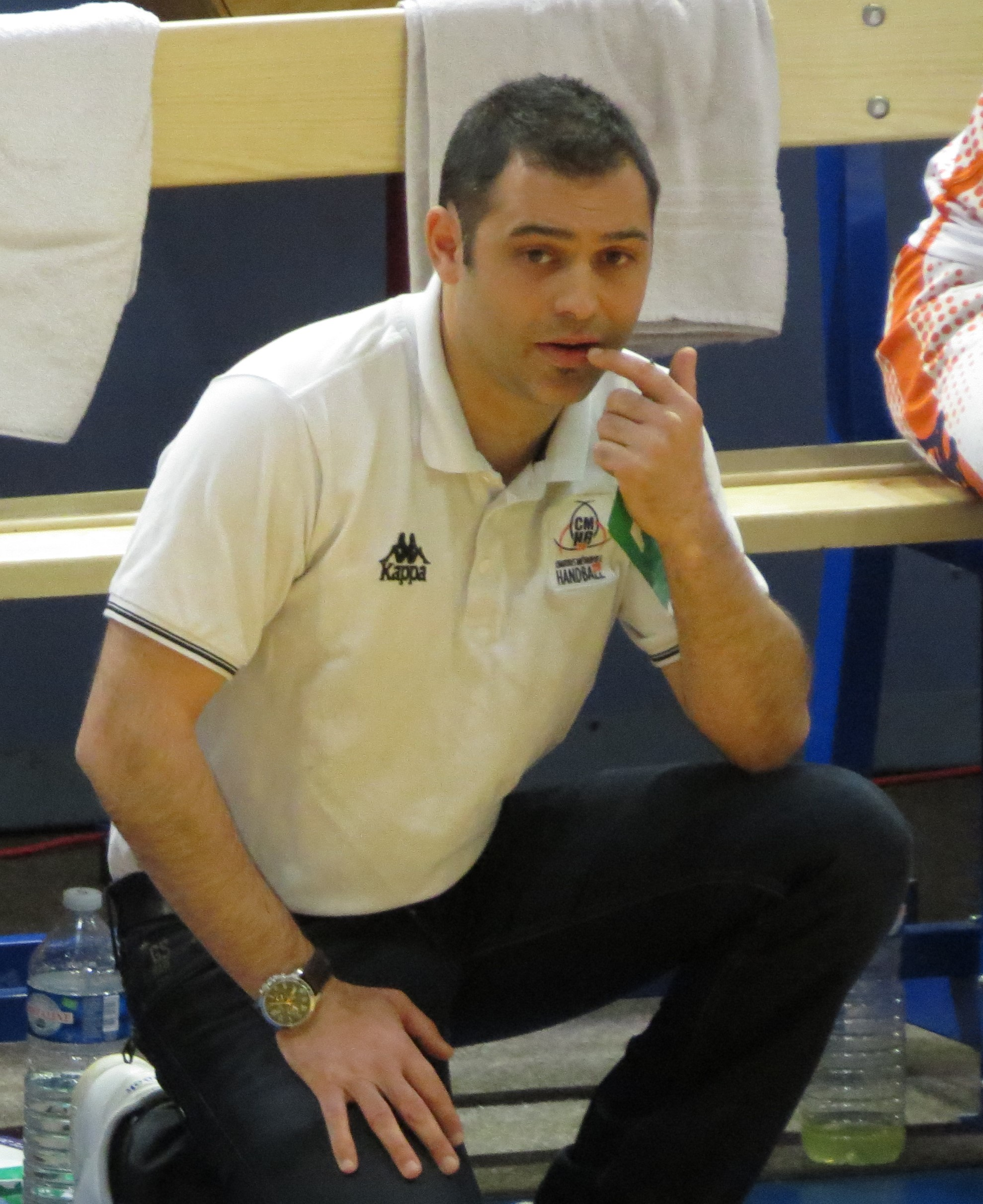 Jérémy Roussel lors de Créteil HB vs Chartres HB - Championnat de France - 5 mai 2016